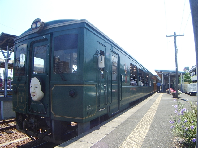 高千穂鉄道「トロッコ神楽号」 TR-400形「天鈿女（あまのうずめ）号」 撮影：takasunrise0921